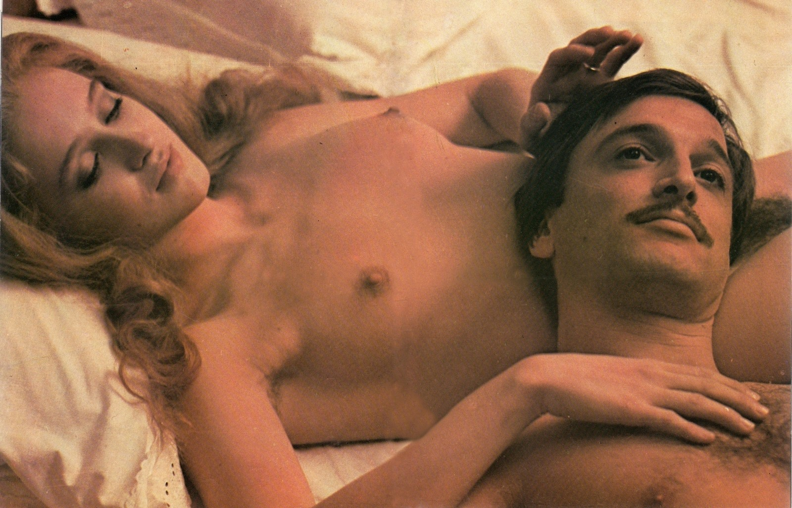 Da sinistra: gli attori Eleonora Giorgi e Maurizio Bonuglia in uno scatto di scena sul set del film Il bacio (1974) di Mario Lanfranchi.